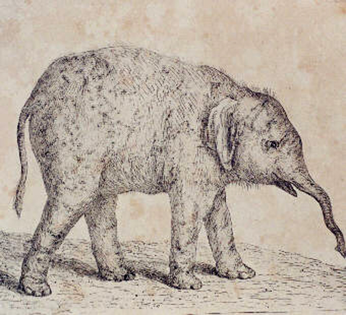 Der Indische Elefant aus der Menagerie von Landgraf Friedrich II. von Hessen-Kassel (Sepia)